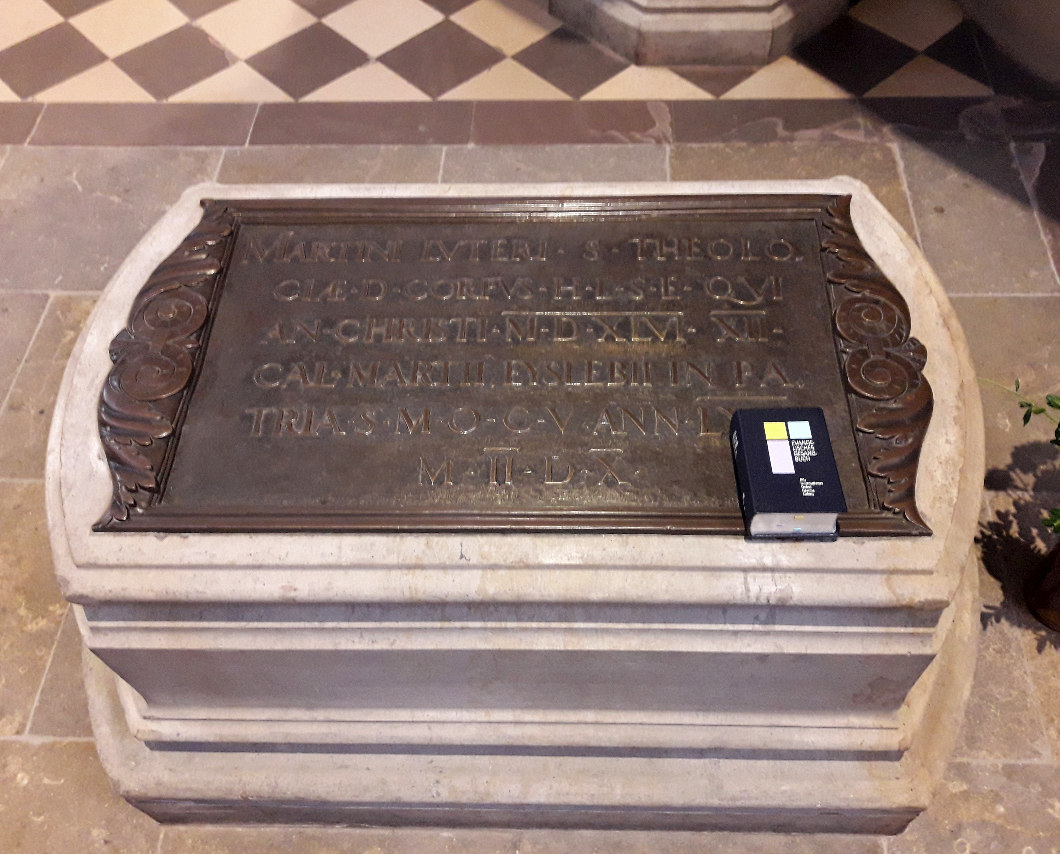 Evangelisches Gesangbuch (Ausgabe für Bayern und Thüringen) auf dem Grab Martin Luthers in der Schlosskirche Wittenberg, anlässlich des 500. Reformationsjubiläums